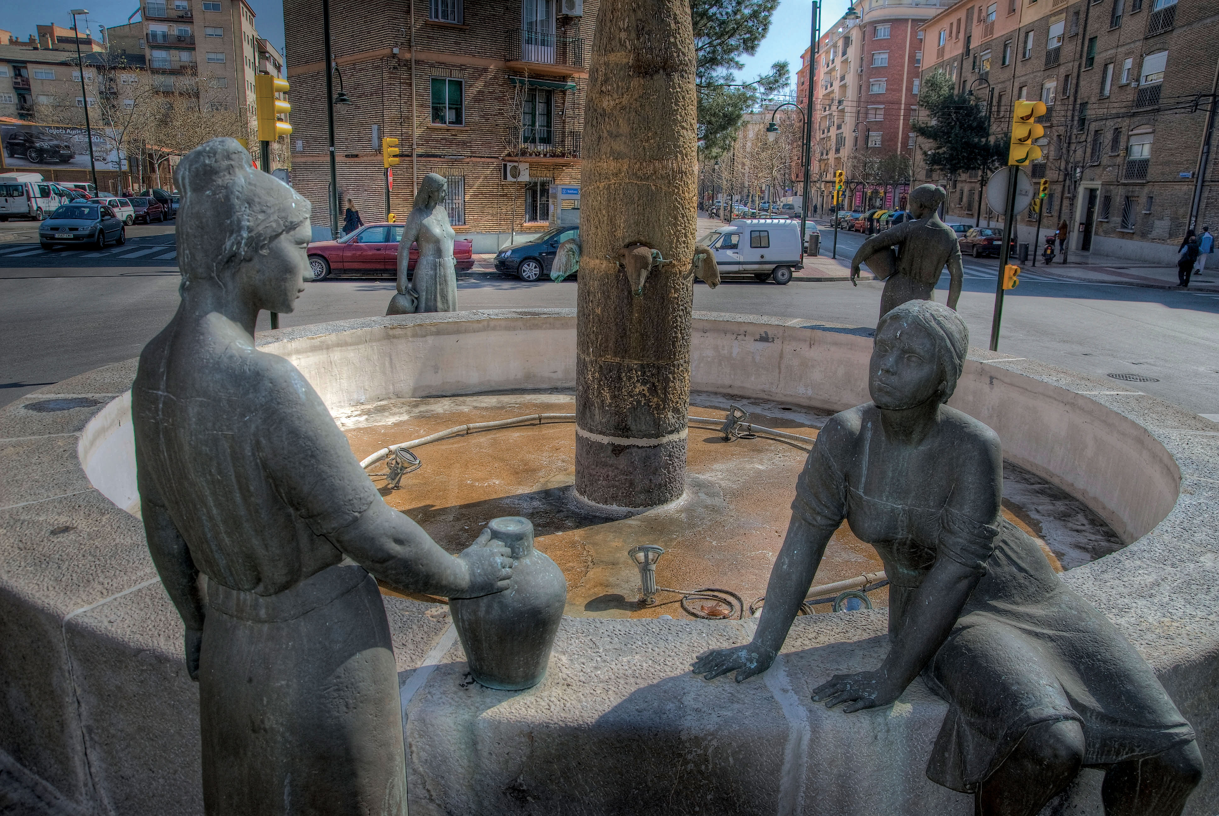 Las Fuentes (Zaragoza)